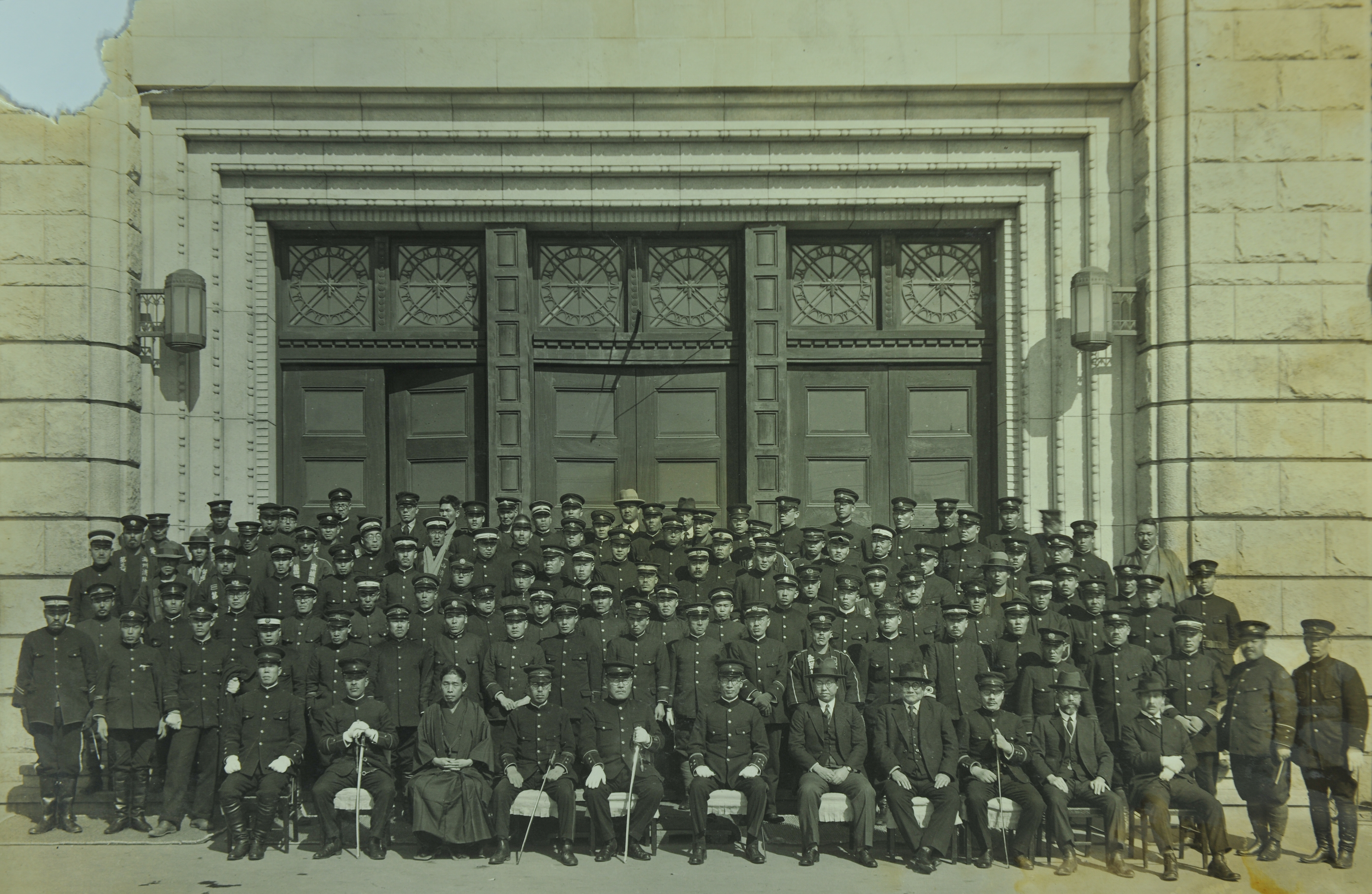 1931년 경성소방서 전직원 기념촬영. 모든 소방대원이 시청앞 현관에서 기념촬영.